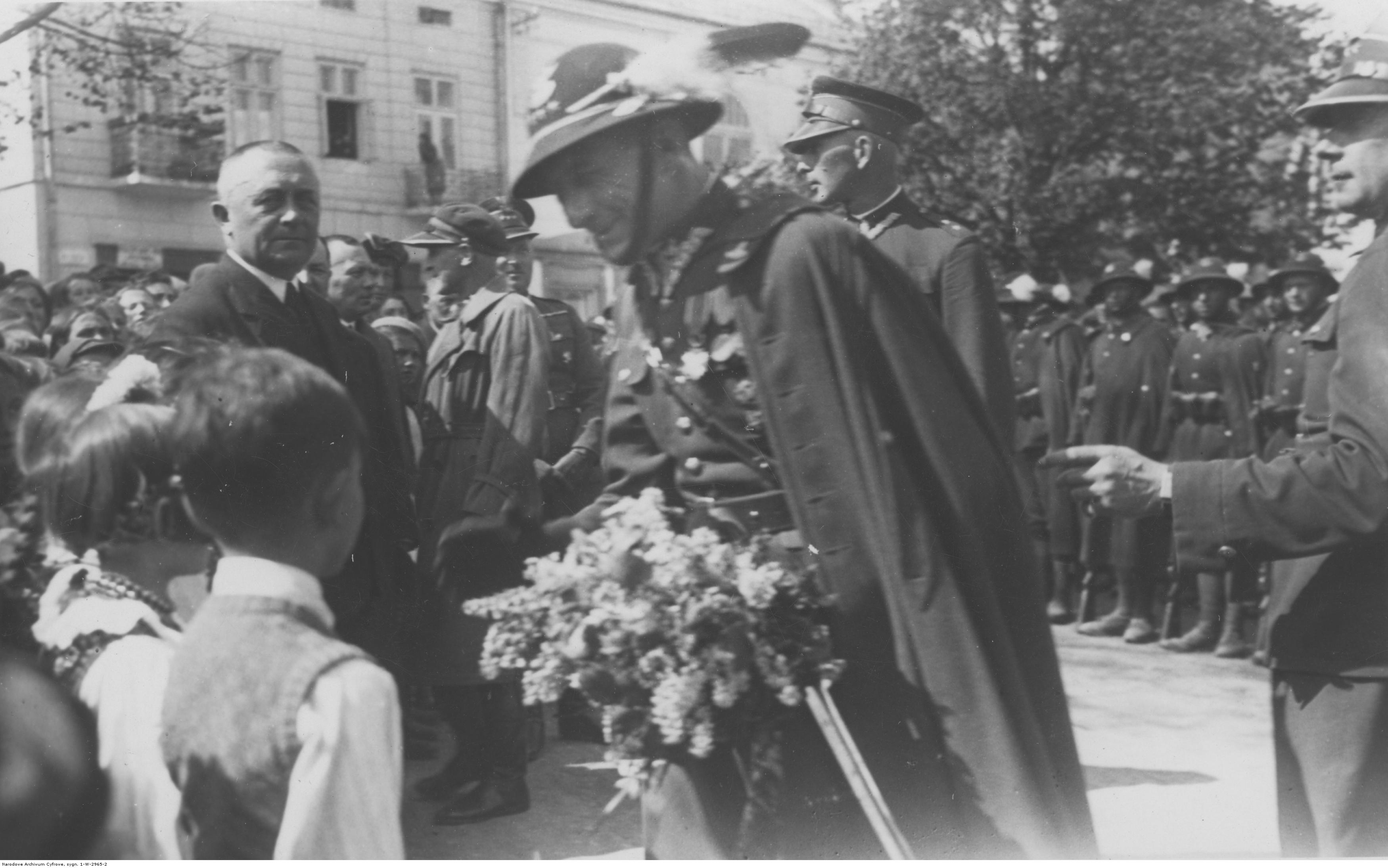 Przekazanie 1 Pułkowi Strzelców Podhalańskich trzech ciężkich karabinów maszynowych ufundowanych przez mieszkańców Gorlic - dzieci wręczają kwiaty strzelcom podhalańskim. Koncern Ilustrowany Kurier Codzienny - Archiwum Ilustracji. Sygnatura: 1-W-2965-2